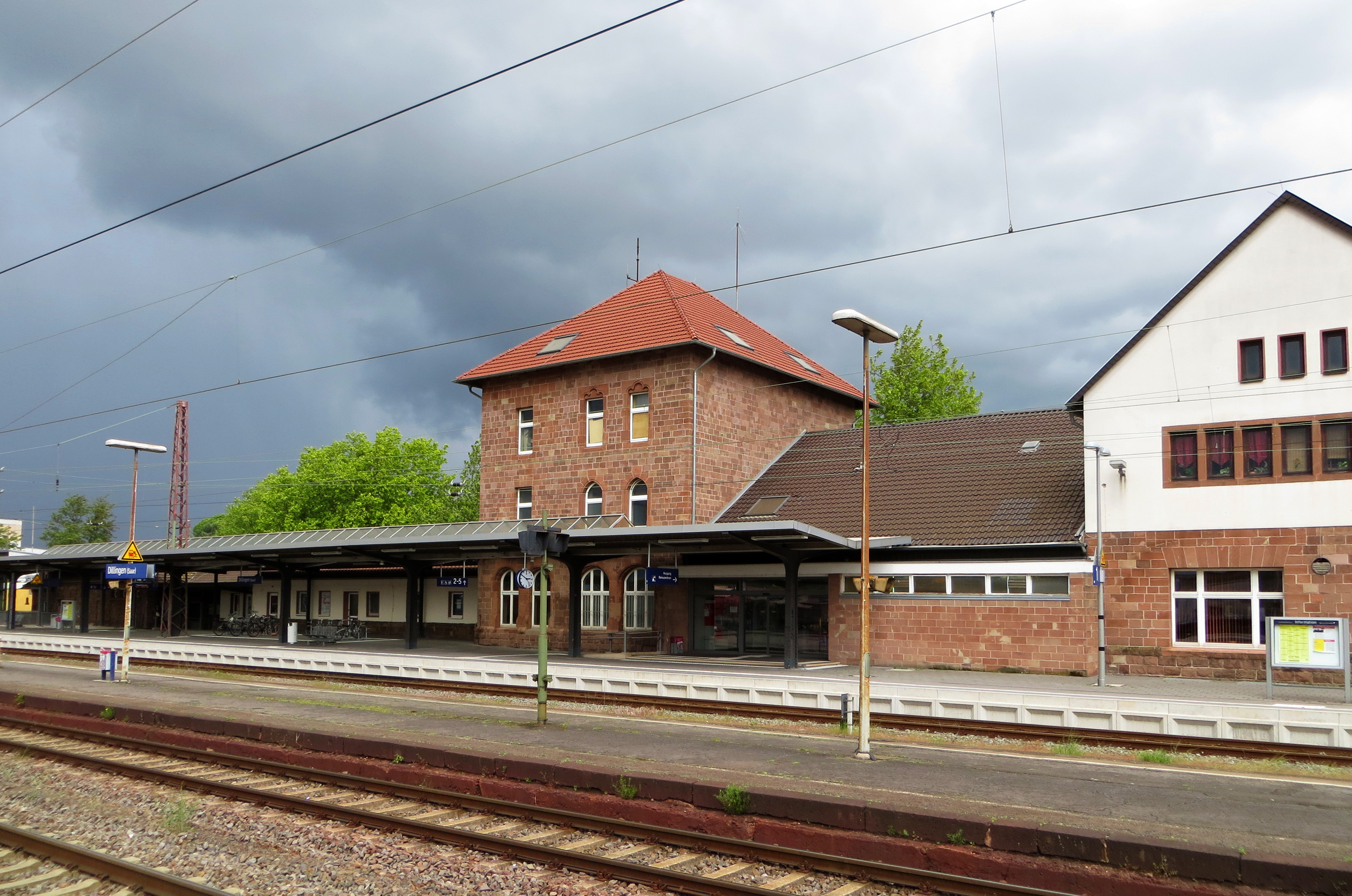 Dillingen, Landkreis Saarlouis, Saarland: Bahnhof Dillingen (Saar)